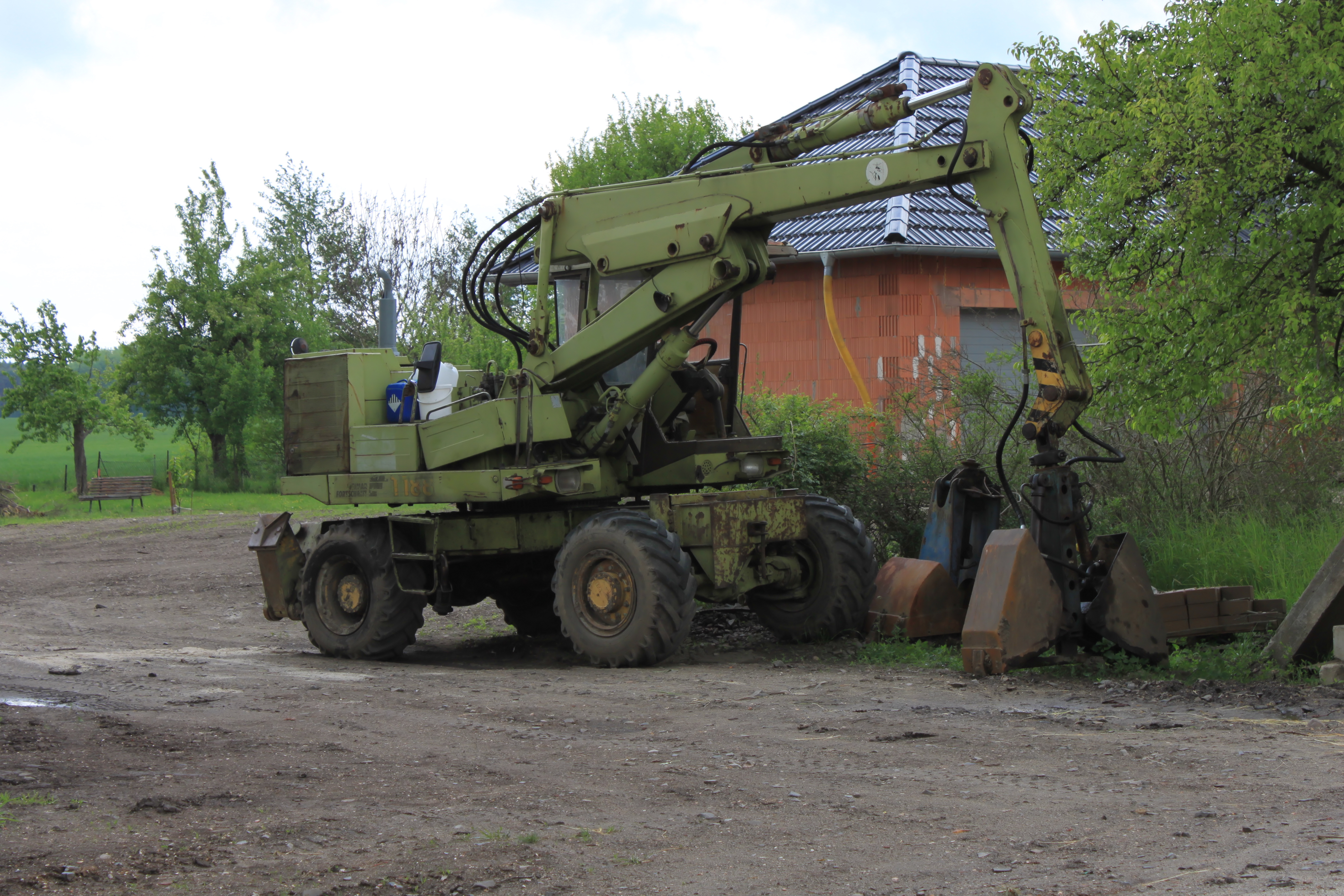 Fortschritt T 188